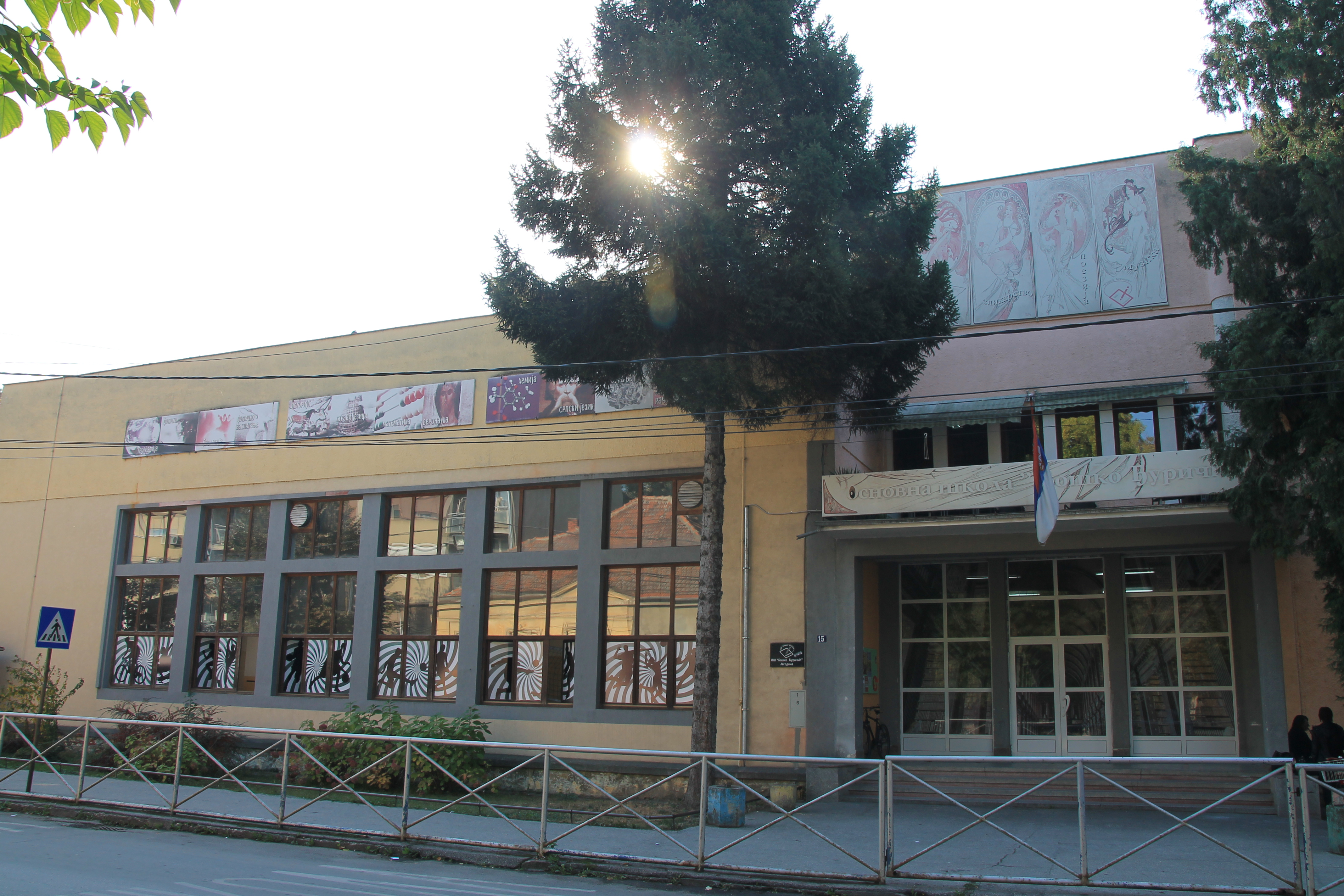 Buildings in Jagodina